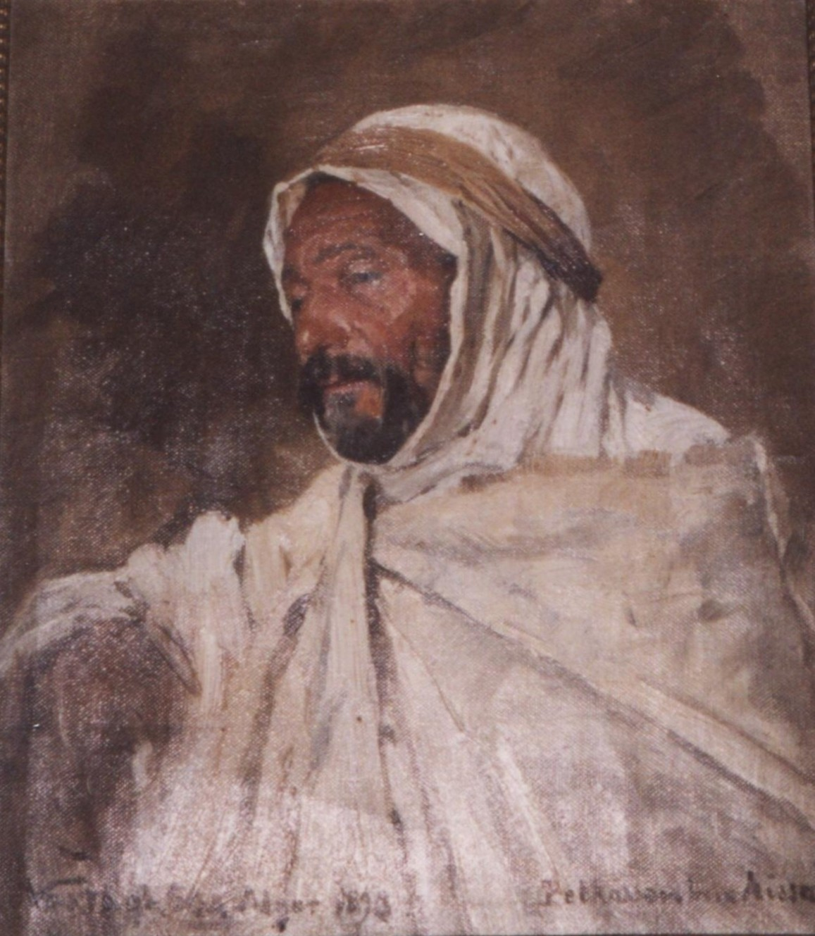 Vastagh Géza: Bel Kassem